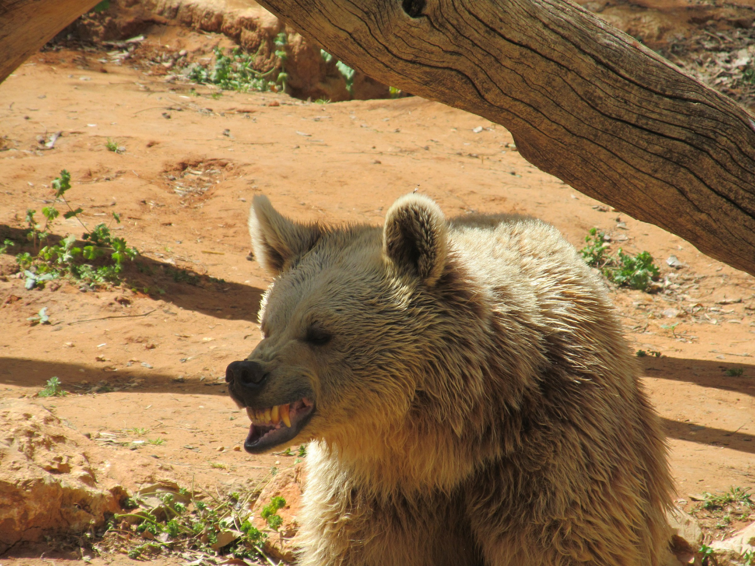 דוב חום סורי חושף שיניים באיום